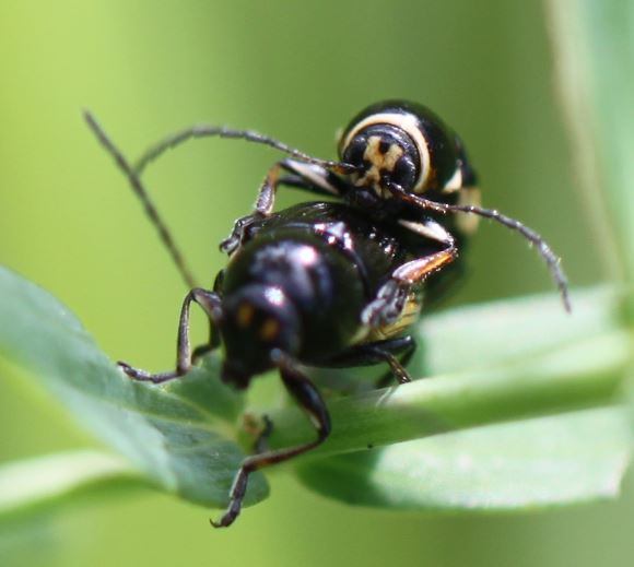 Paarende Käfer der Art Cryptocephalus moraei auf Echtem Johanniskraut (Hypericum perforatum), am 1. Juni 2018 in der Schwetzinger Hardt